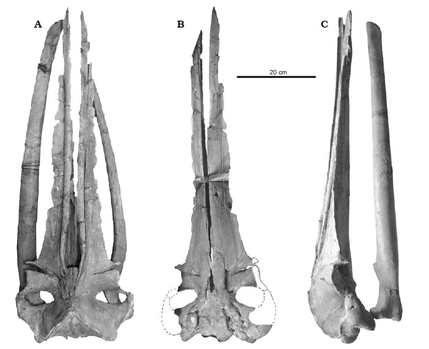 Skull of the cetotheriid baleen whale Cetotherium riabinini Hofstein, 1948, Late Miocene of Nikolaev, Ukraine, NMNH-P 668/1, in dorsal (A), ventral (B, dashed lines indicate areas obscured by the mandibles), and lateral (C) views.